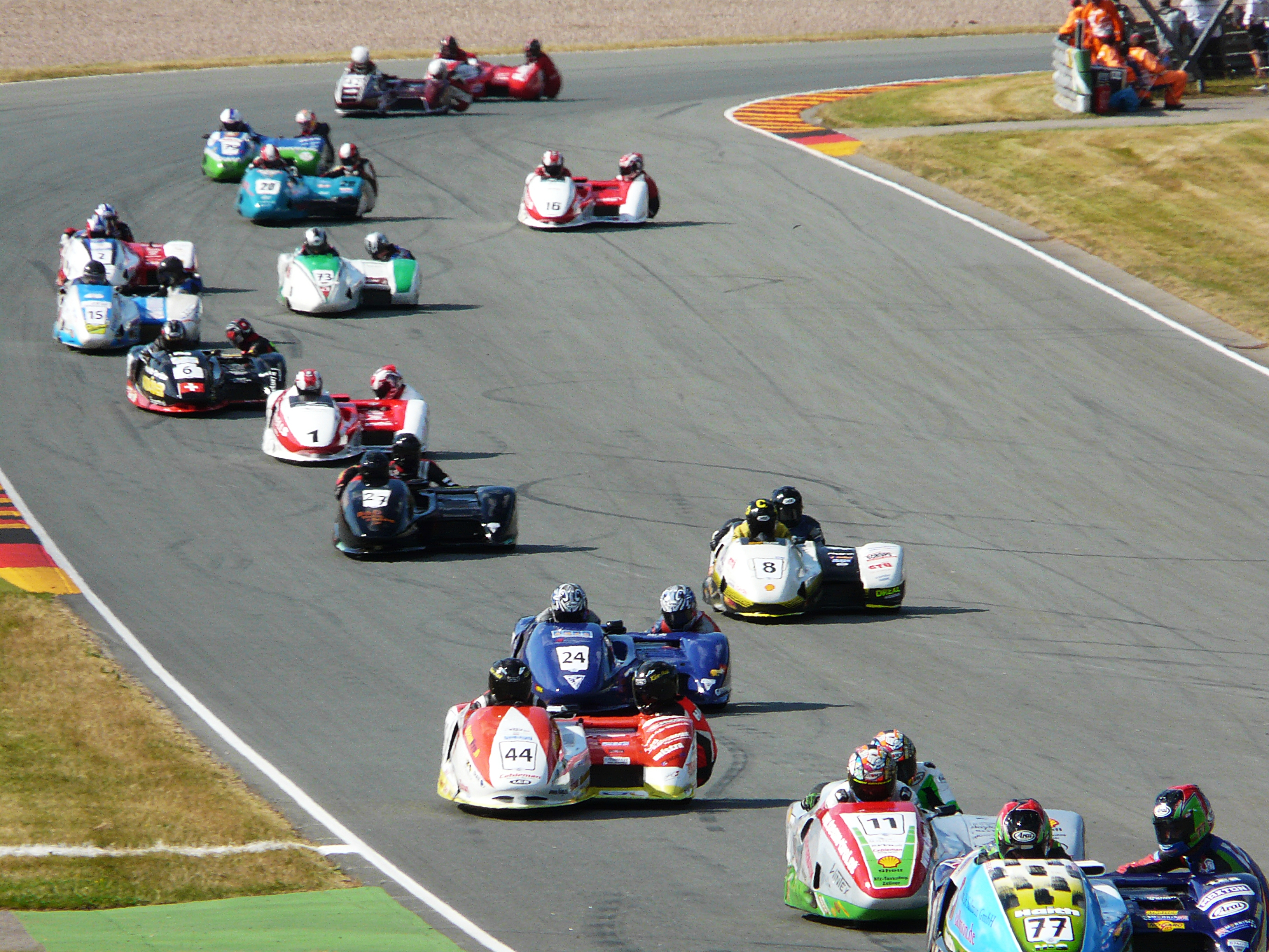 FIM Sidecar Starterfeld